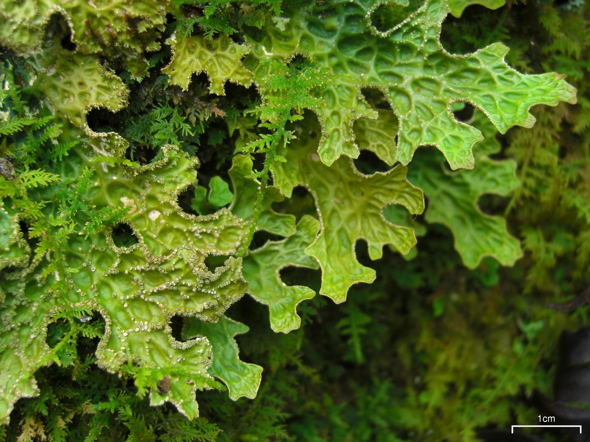 Lobaria pulmonaria 20091119.103 US, NC, Smoky Mountains